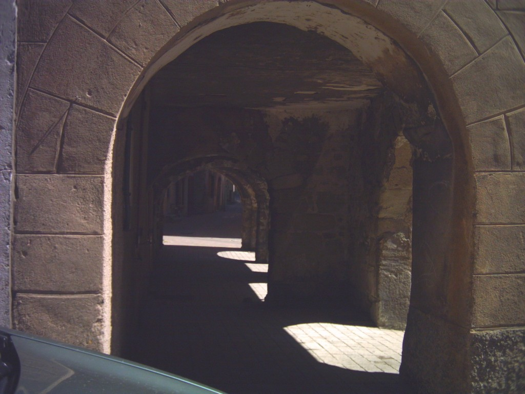 Les "tounes" de Saint-Bonnet